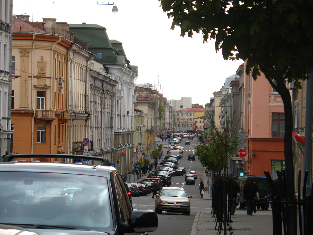 Карла Маркса 53° 53' 57.34" N 27° 33' 36.46" E